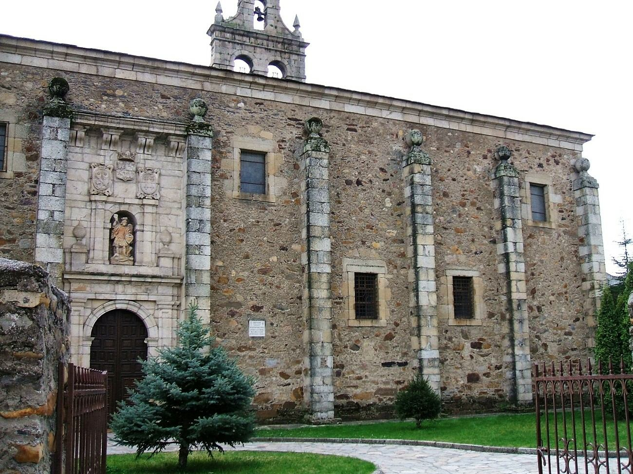 Fachada del Monasterio de MM Cistercienses de San Miguel de las Dueñas, provincia de León, España